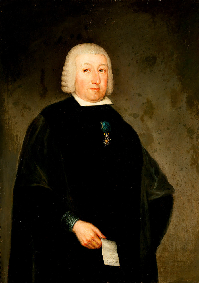 Retrato del magistrado español de origen aragonés José de Cistué y Coll (1723-1808).